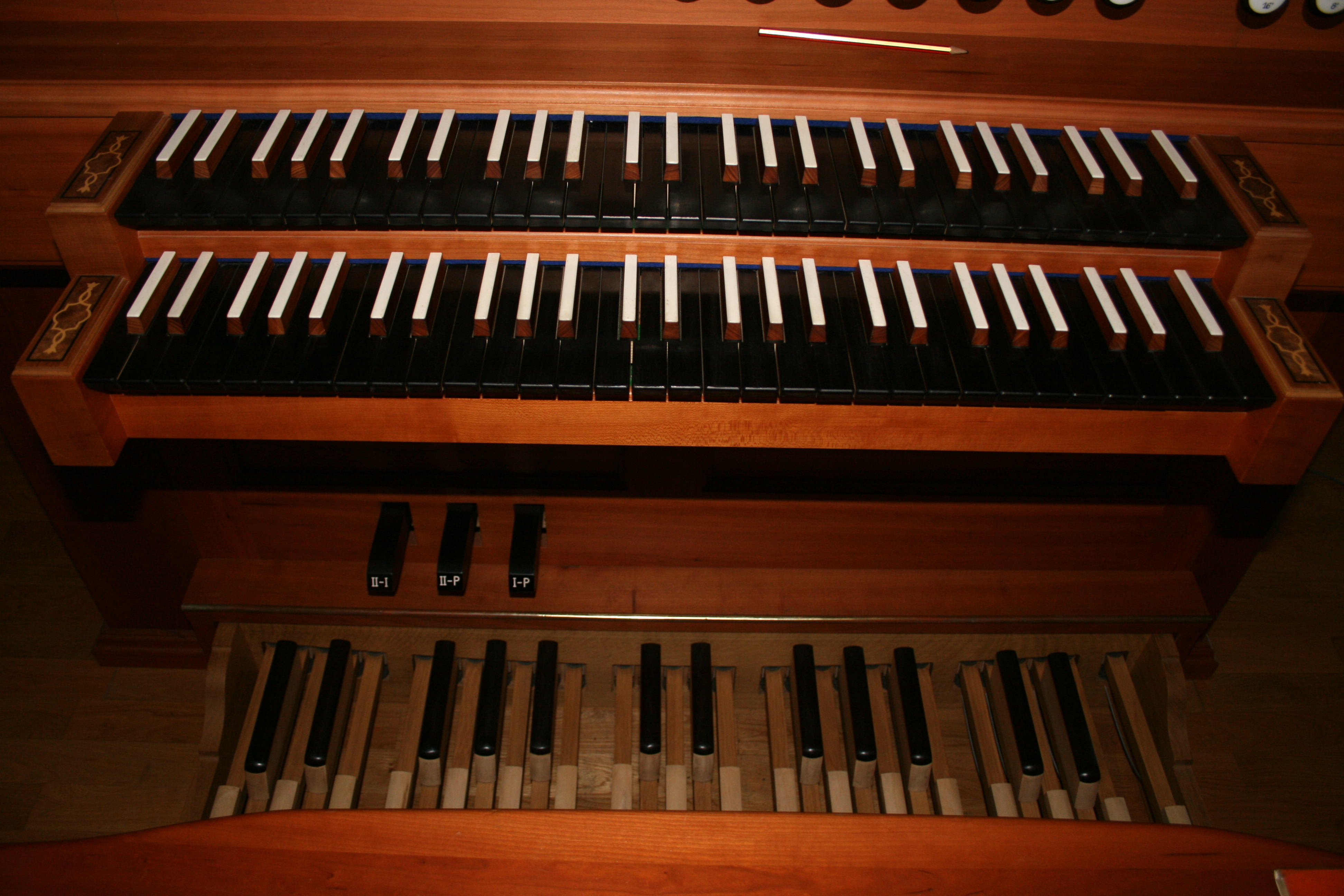 Spieltisch der Orgel von St. Ulrich, Amendingen